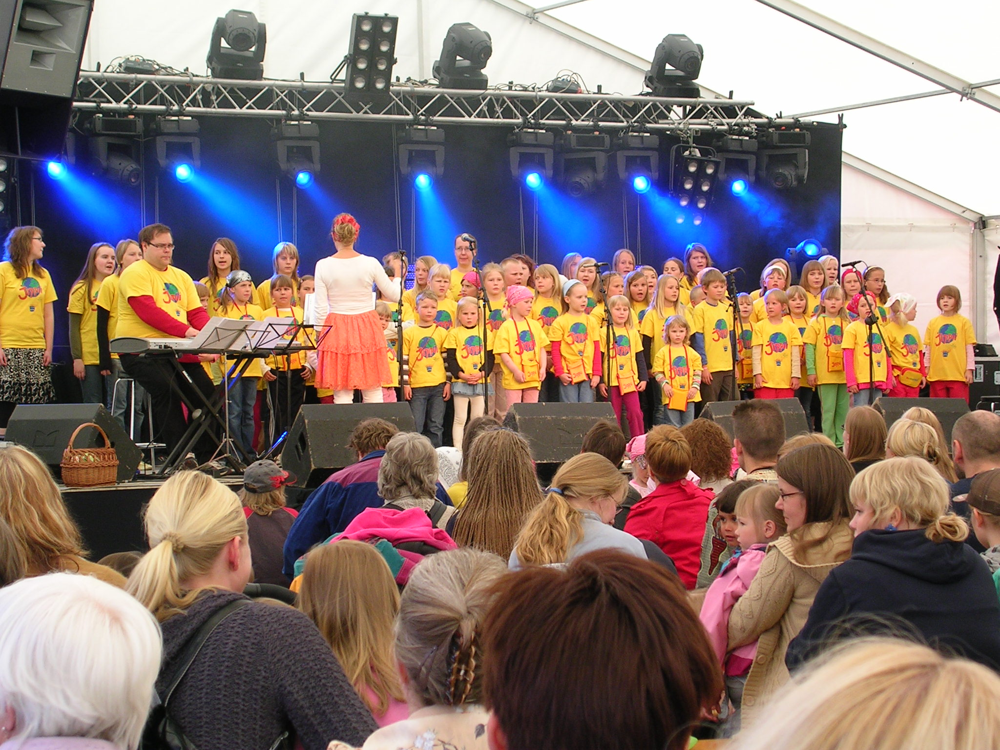 Jippii-lapsikuoro esiintymässä helluntaiherätyksen Juhannuskonferenssissa vuonna 2009.